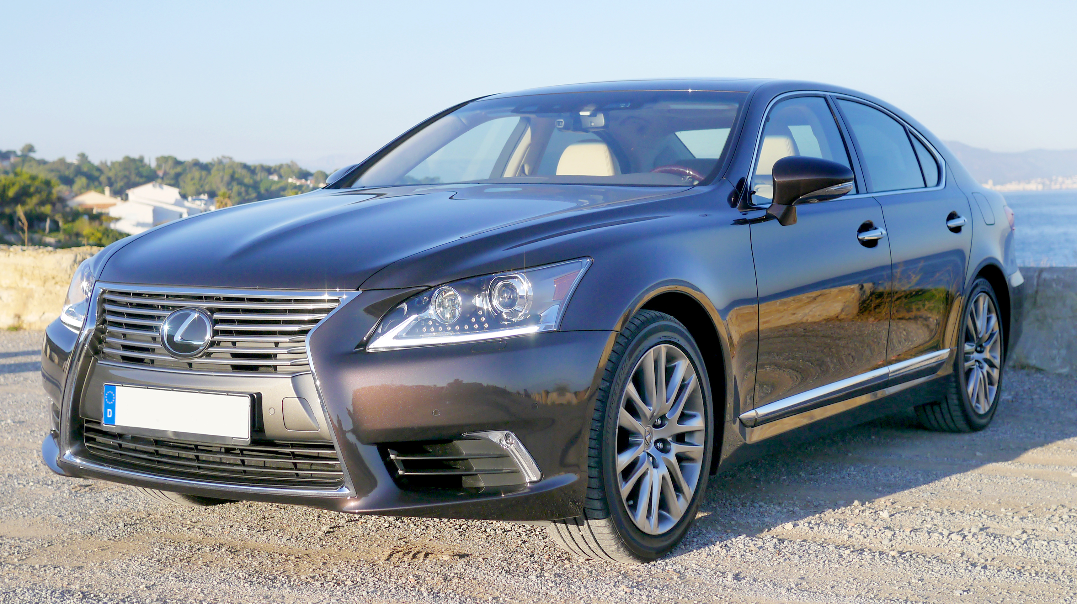 Lexus LS 2013 launch Cannes